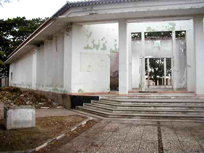 Aspecto do antigo Tribunal de Díli